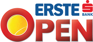 ATP Wien Logo